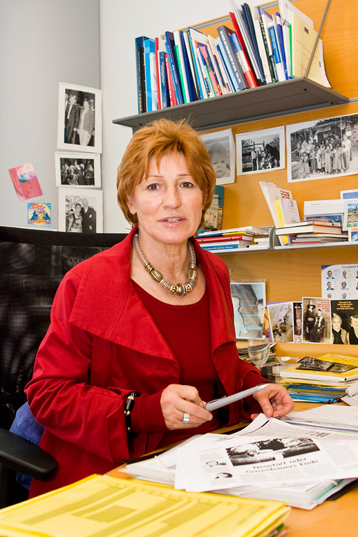 MdEP Christa Prets